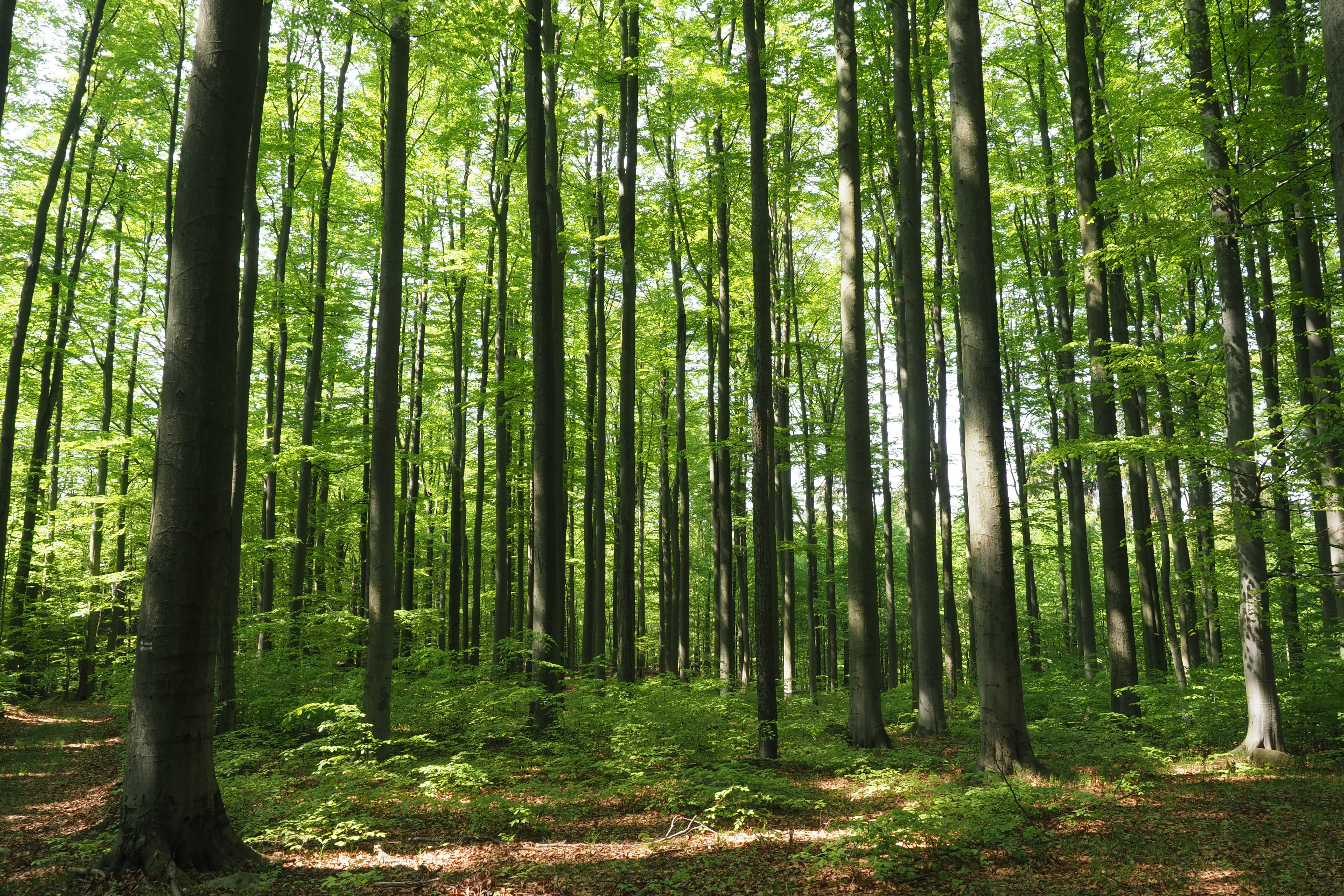 Heilige Hallen, Naturschutzgebiet bei Sebnitz am Fuß des Tanzplans